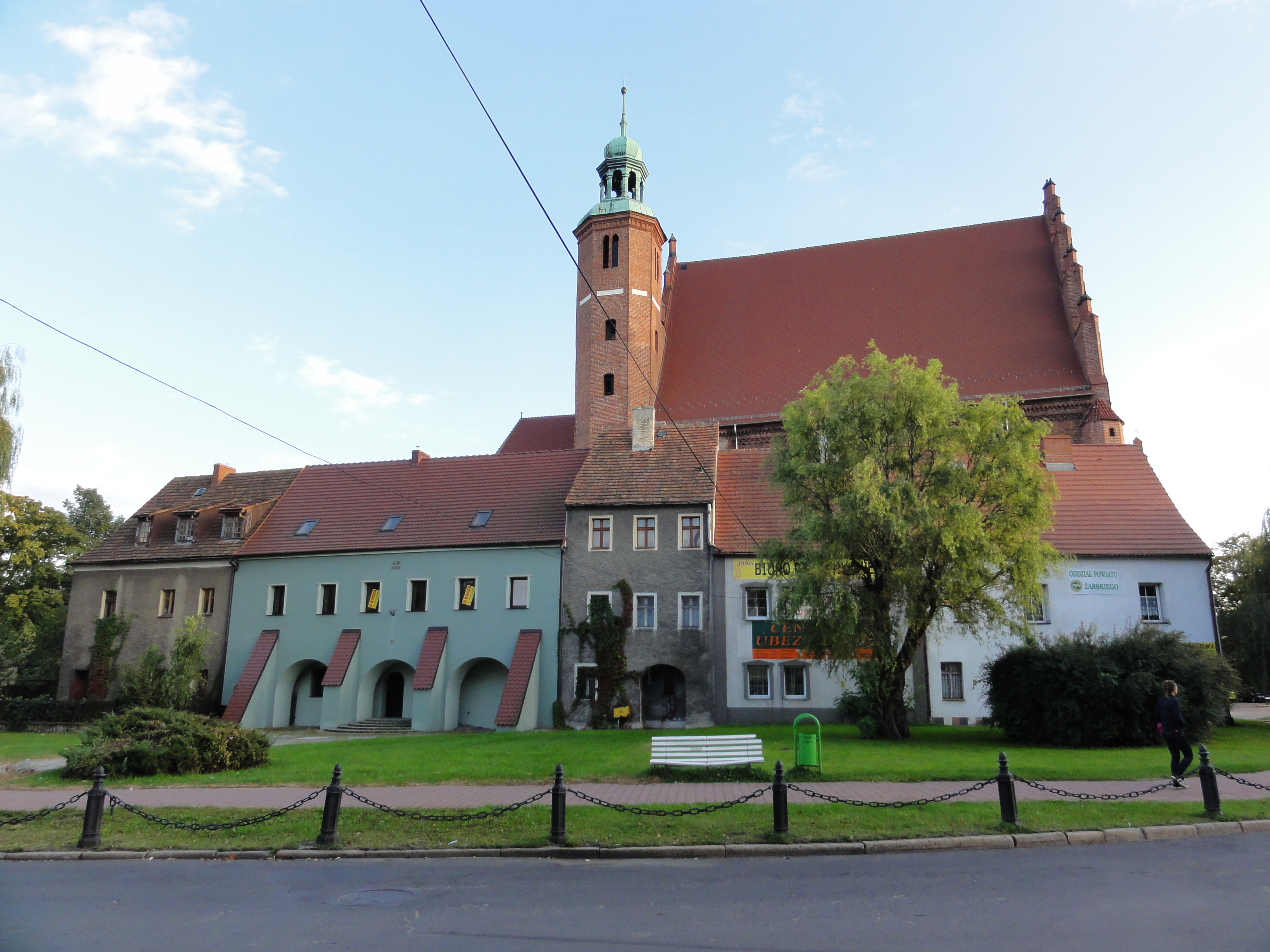 zespół zabudowy (kościół p.w. NMP, ob. polsko-kat. p.w. Dobrego Pasterza, 2 domy przy murach obronnych, domy nr: 7,8, 9/10, 11, 12, 13, 14) Żary, pl. Kościelny, Żary